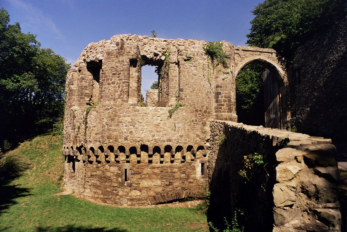 Burg Olbrück, Pulverturm und Eingangstor